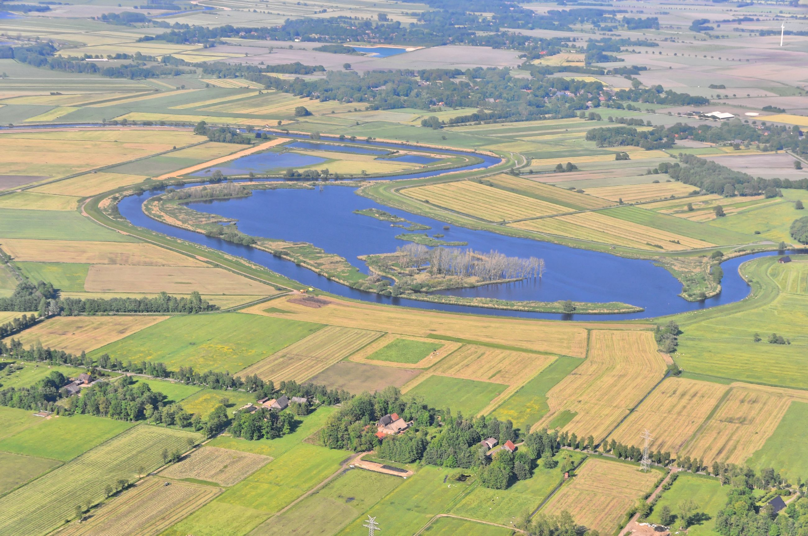 Überführungsflug vom Flugplatz Nordholz-Spieka über Lüneburg, Potsdam zum Flugplatz Schwarzheide-Schipkau